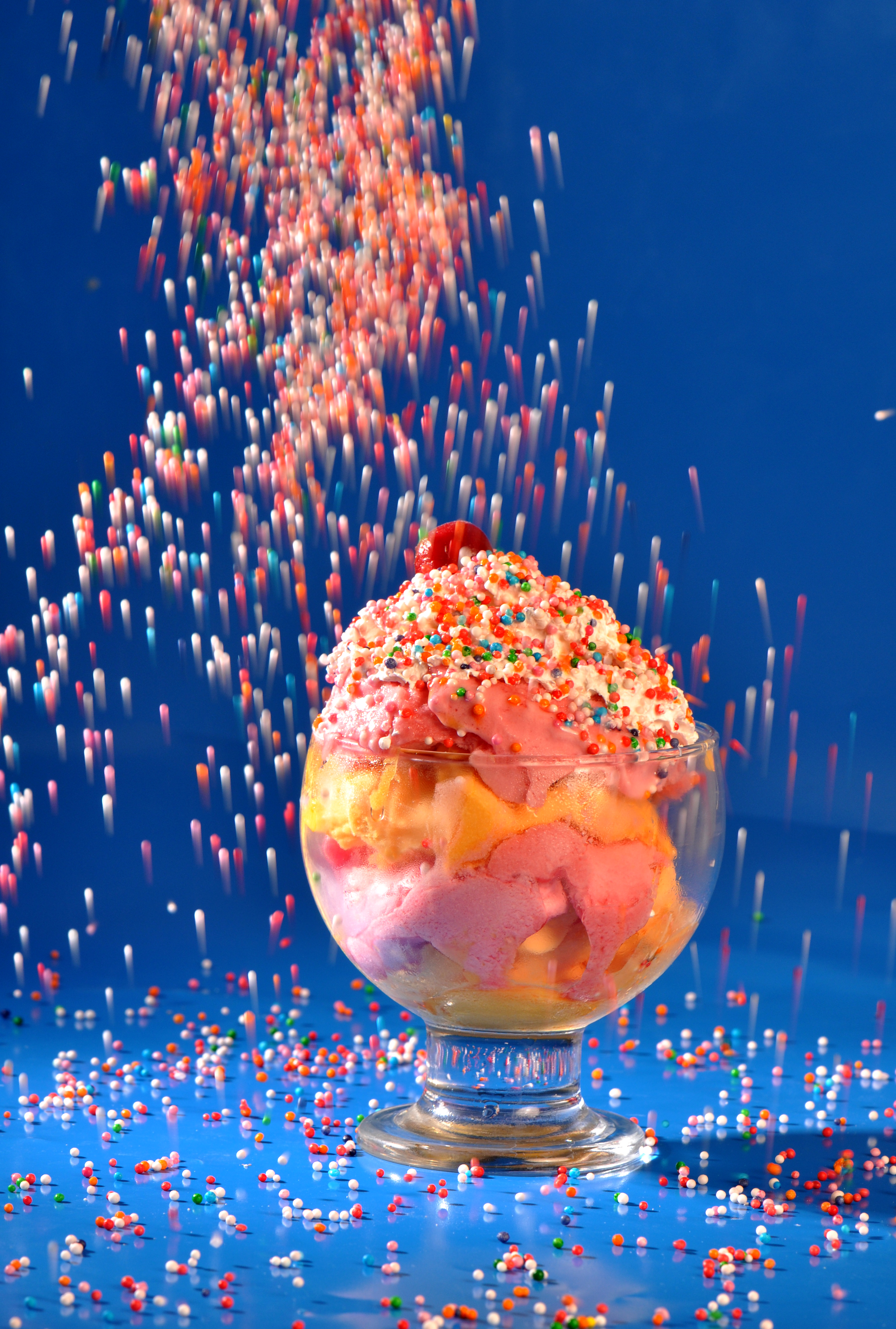 סוכריות לקישוט רז אמיגה תיכון רוטברג